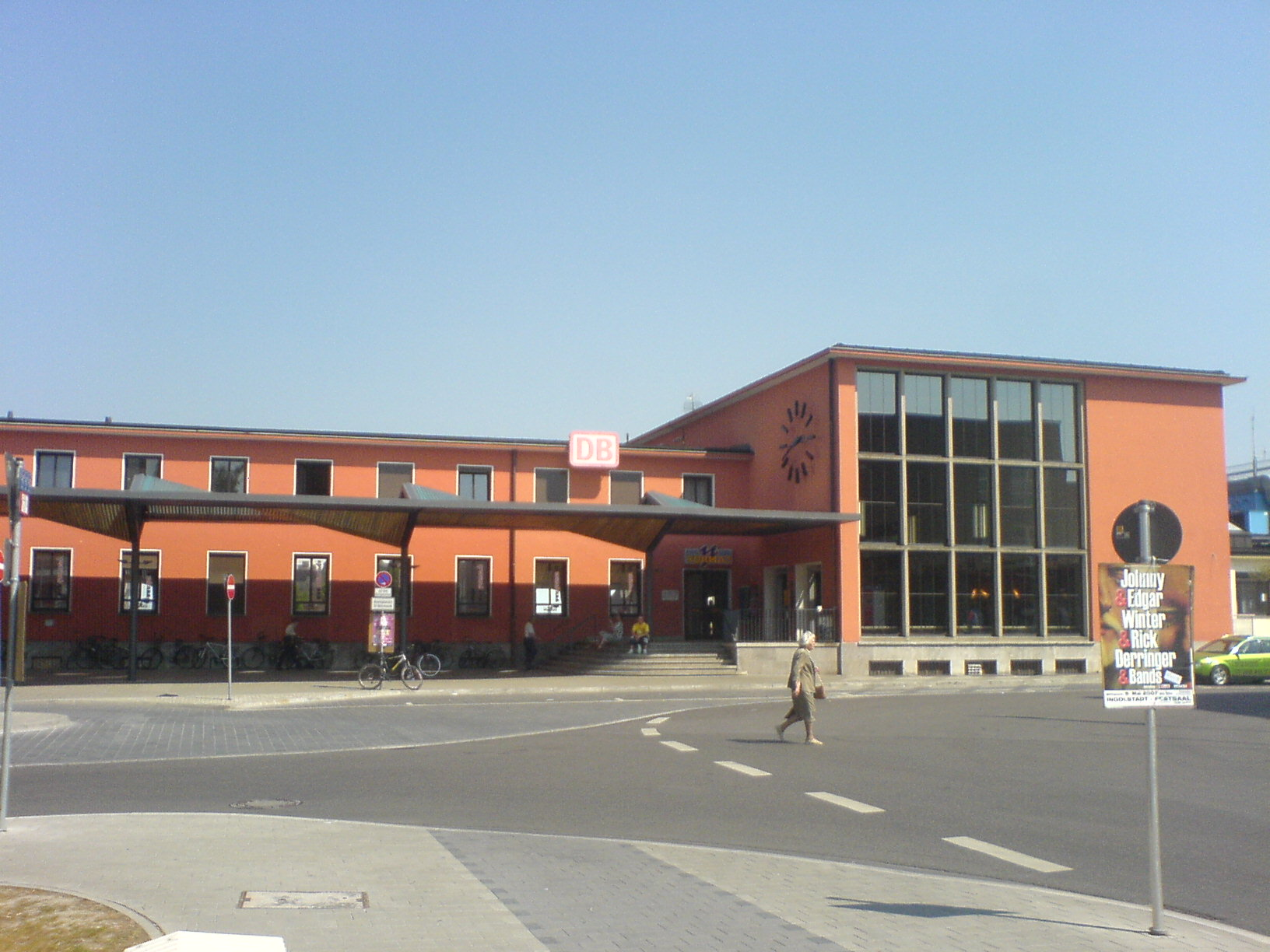 Bahnhofsgebäude des Ingolstädter Hauptbahnhofs. Ingolstadt, Bayern, Deutschland.